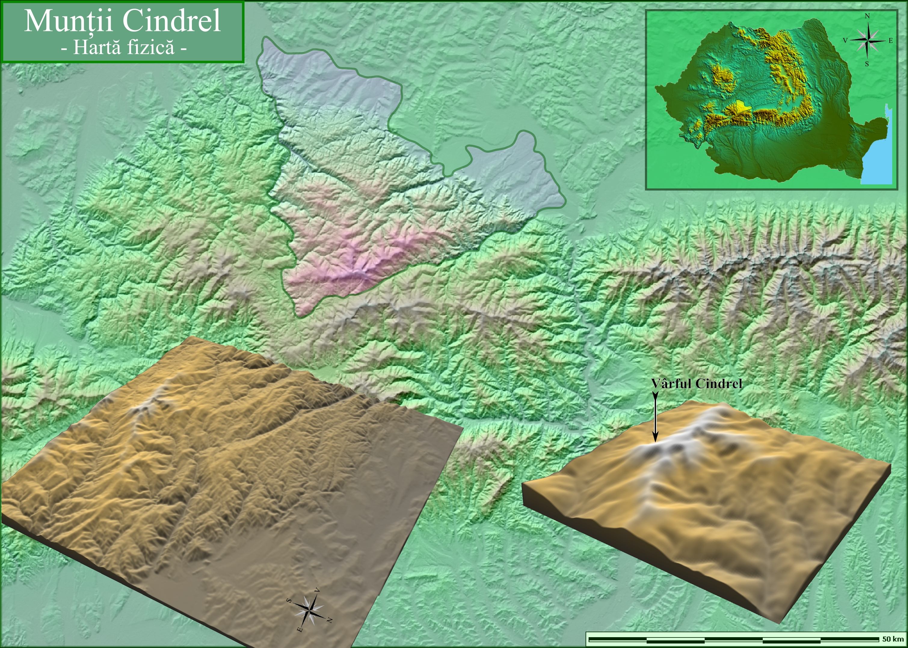 Munţii Cindrel, reprezentare fizică. Imaginea a fost creată după date SRTM furnizate liber de NASA